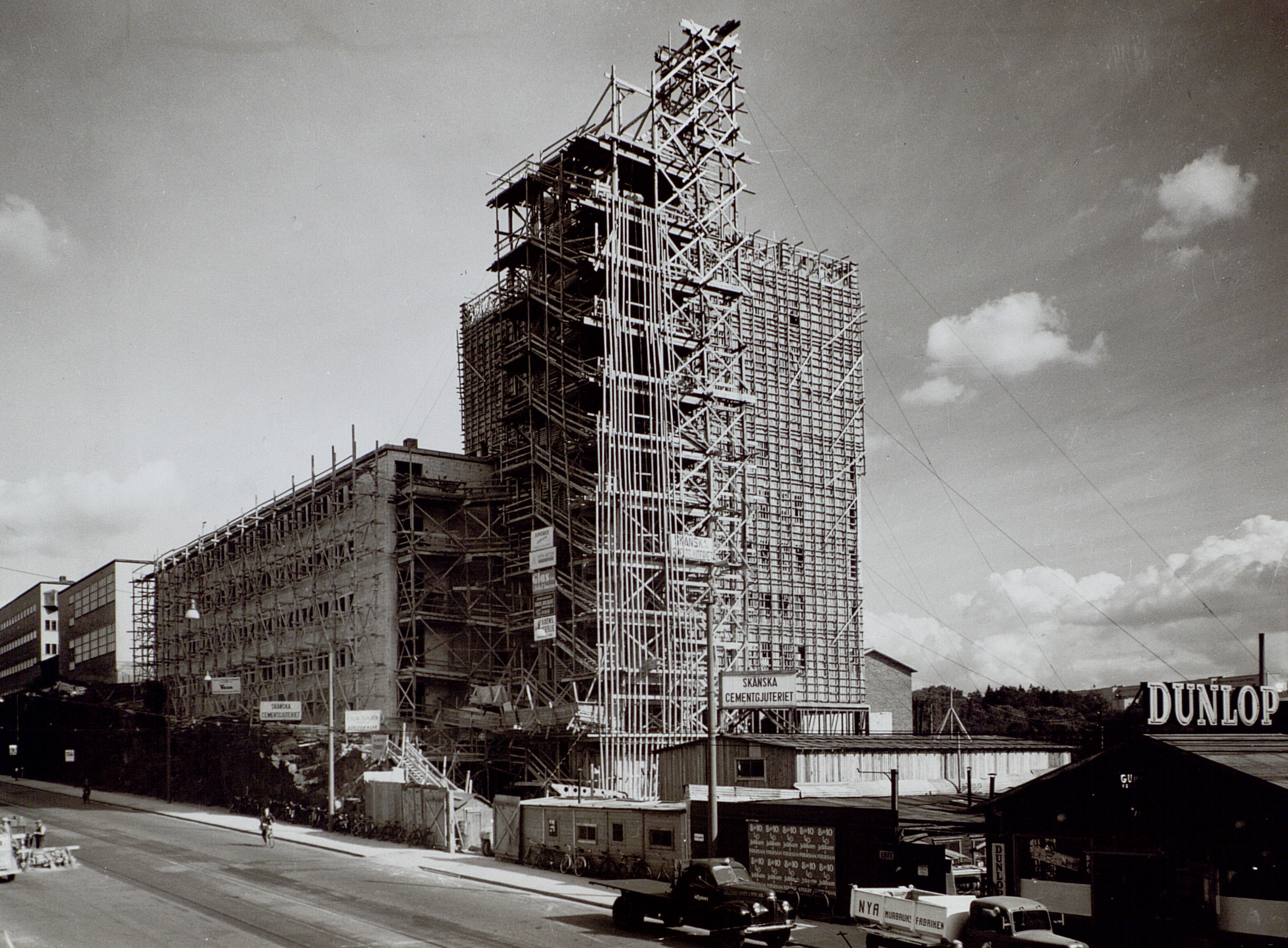 Teleskolan vid Hornsgatan under byggnad